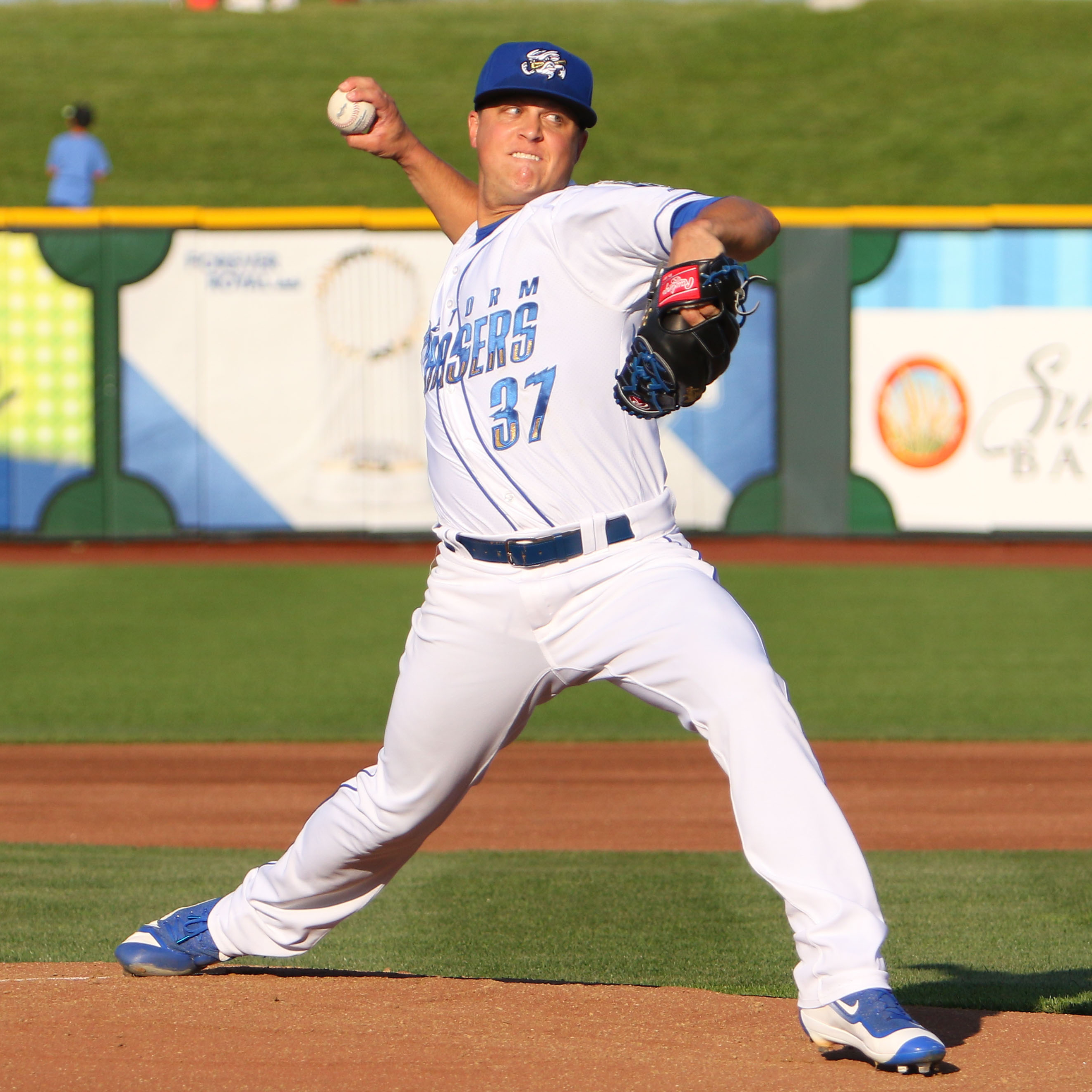 Kris Medlen